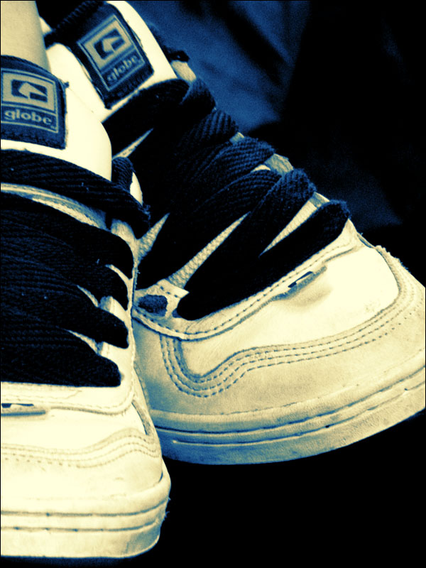 נעלי גלוב.